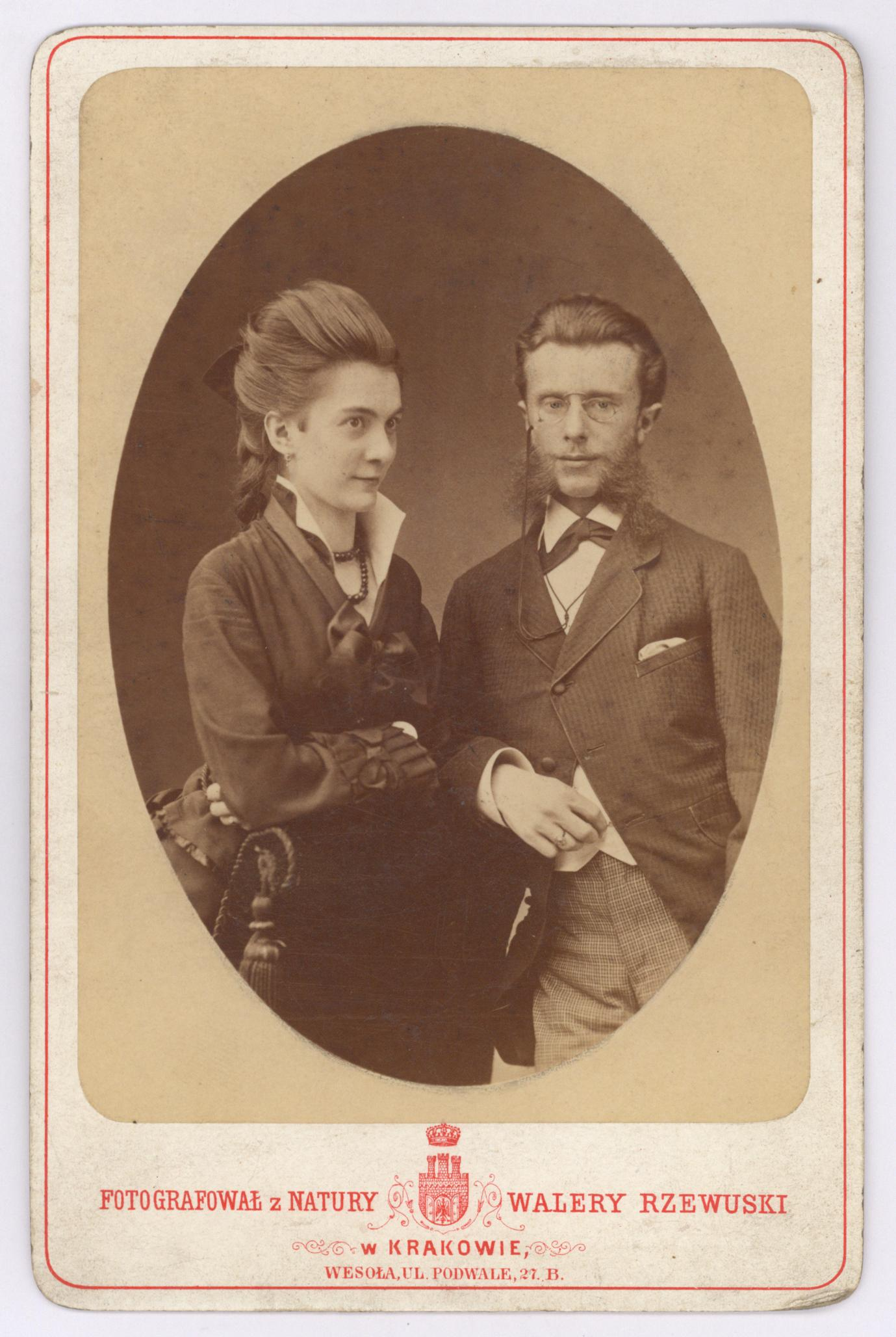 Kazimierz Bartoszewicz polski historyk, publicysta, satyryk, wydawca i kolekcjoner sztuki wraz z żoną Amelią